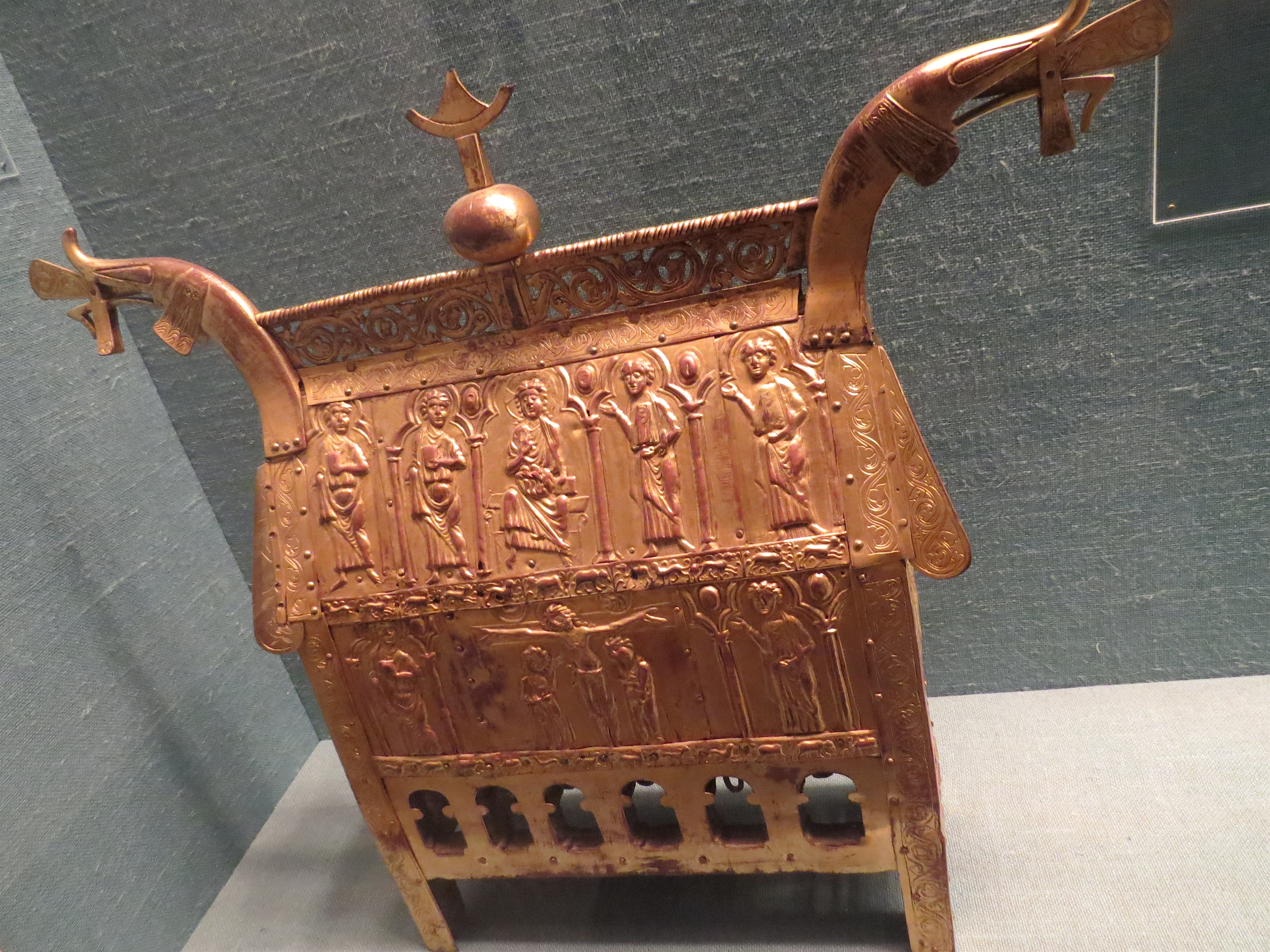 Vatnåsskrinet, i Nationalmuseet opført som stammende fra Vatnås Kirke i Norge, Nationalmuséet i København